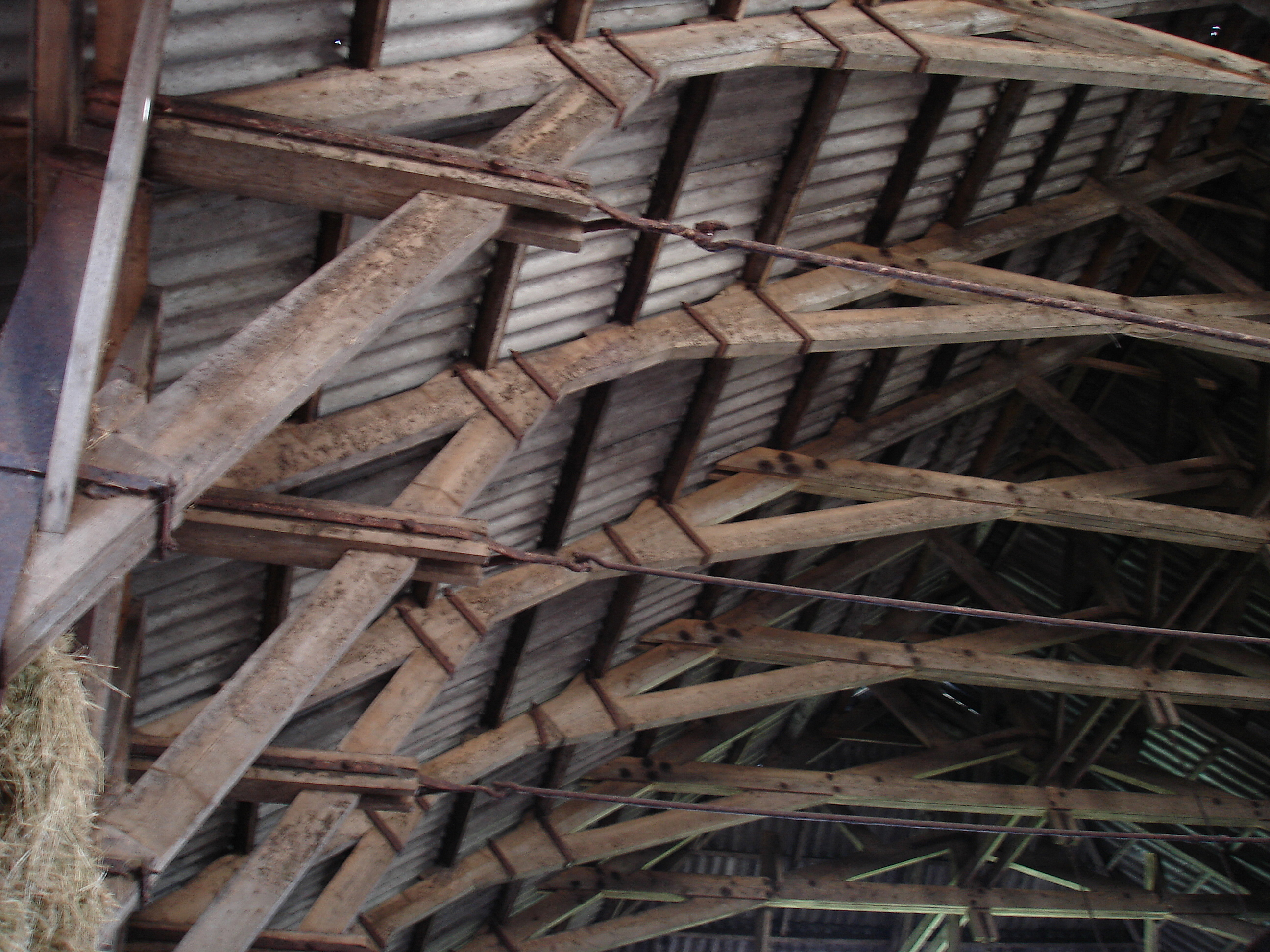 Dakconstructie van Steenfabriek IJsseloord in Willeskop.